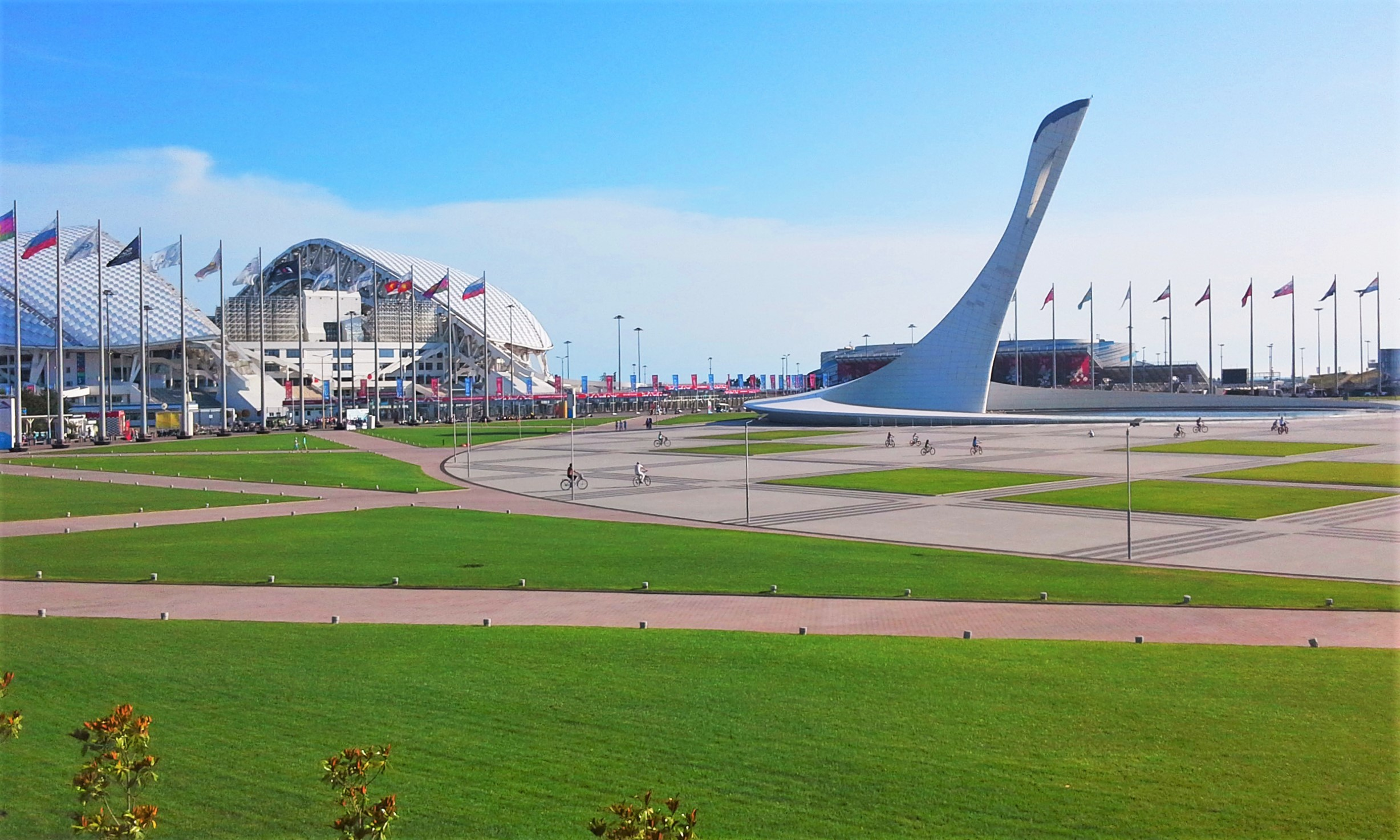 Сочи, Краснодарский Край, Российская Федерация